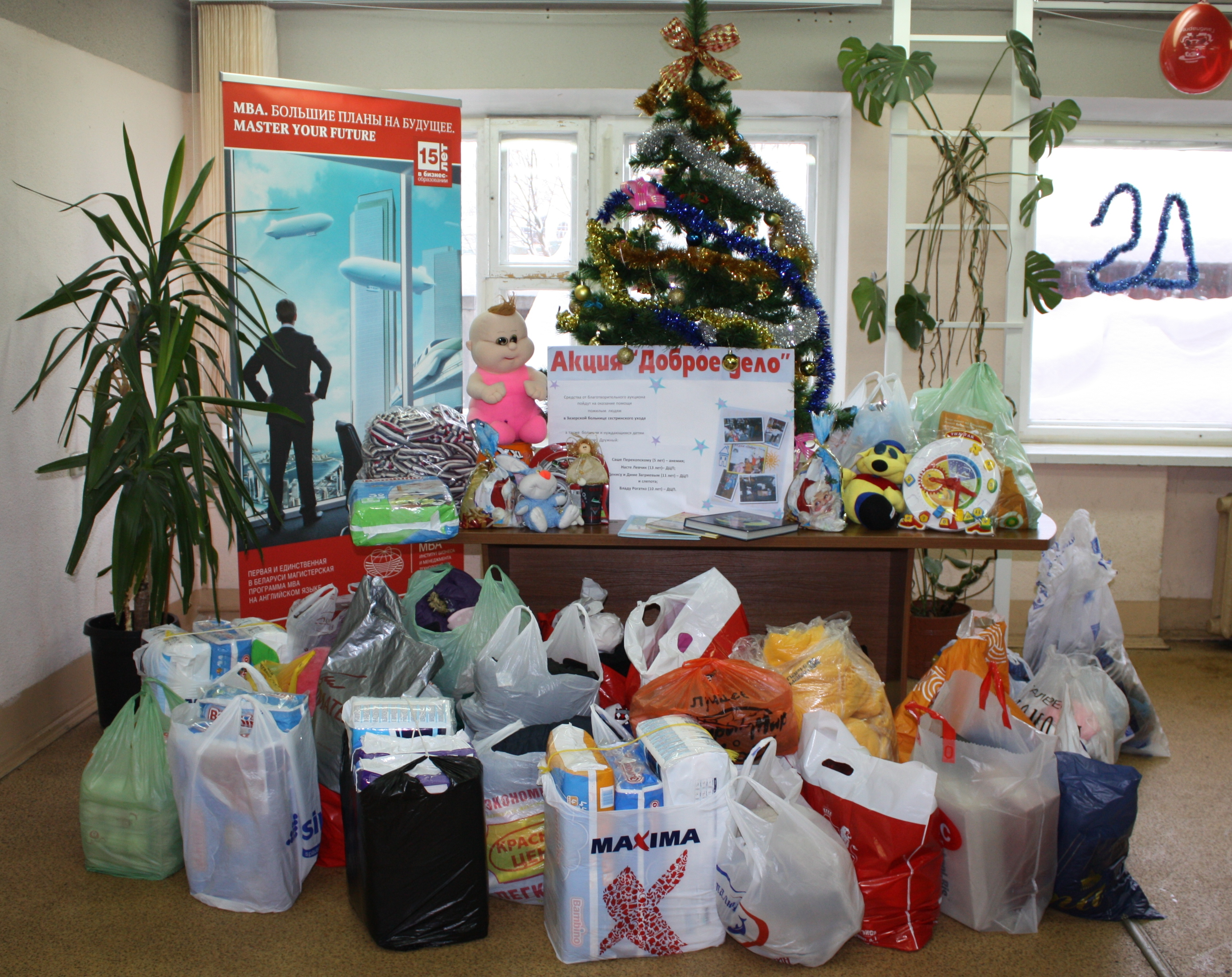 Акция "Доброе дело", декабрь 2012, сбор средств для детей из приюта